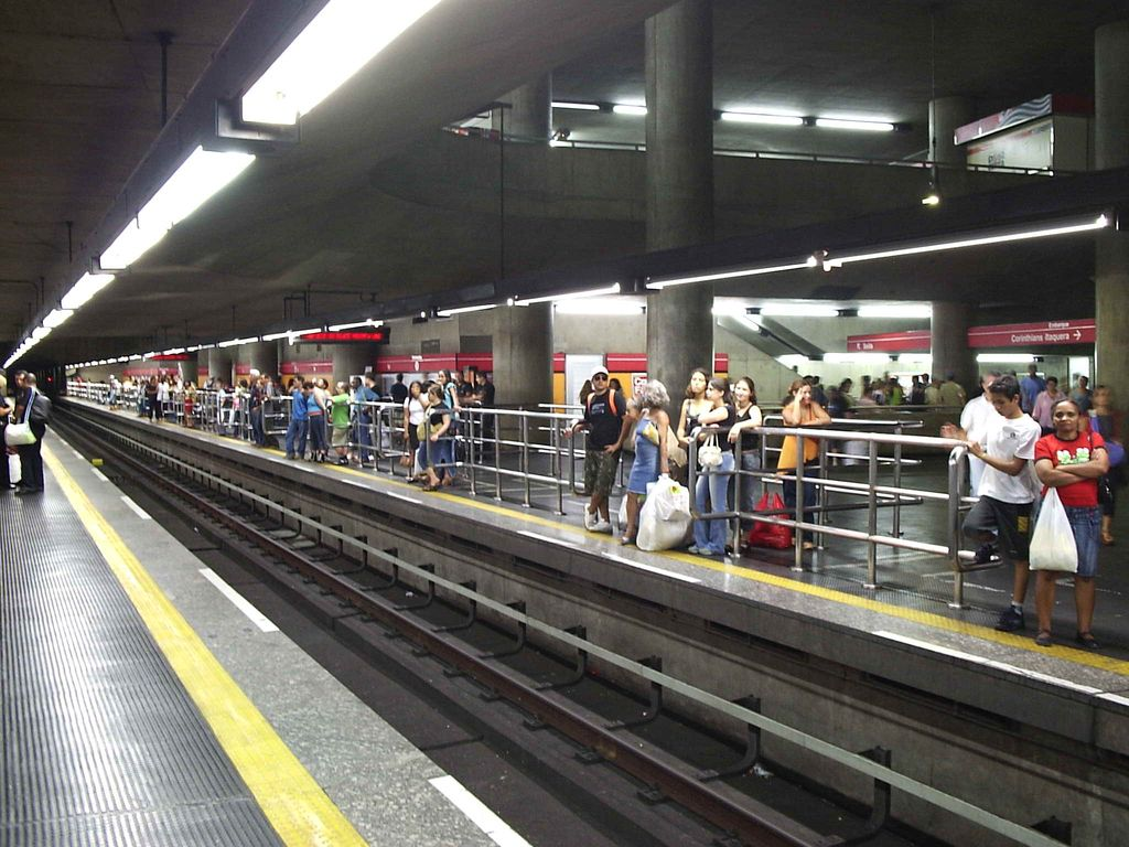 Metrô de São Paulo - Line 3 - Red - Sé